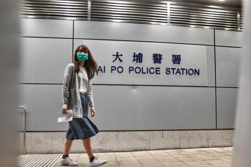 前眾志成員周庭昨日（10日）因《國安法》被捕，剛才在大埔警署獲准以 2 萬元現金、18 萬元人事擔保保釋，並沒收護照。